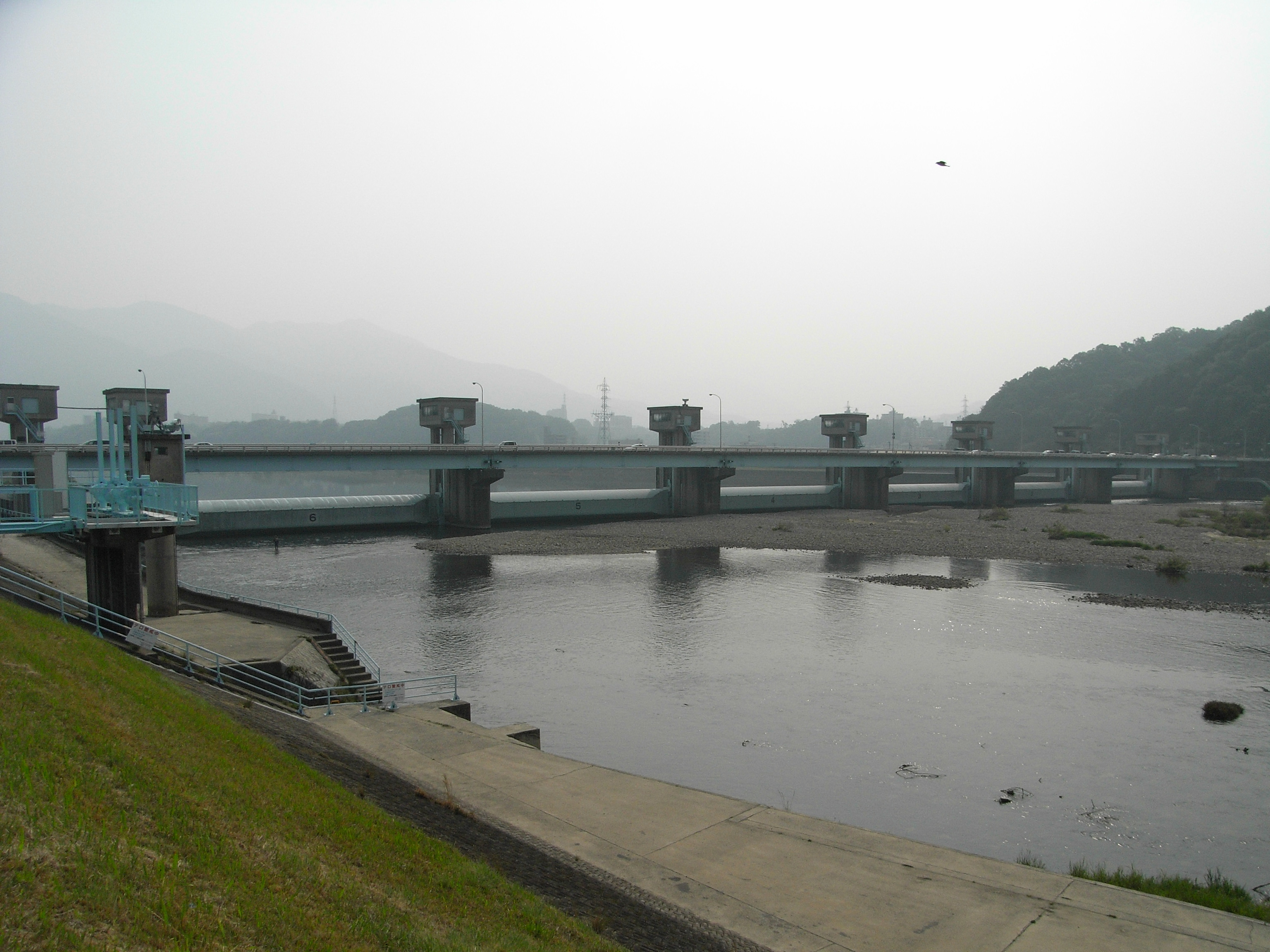 Dam